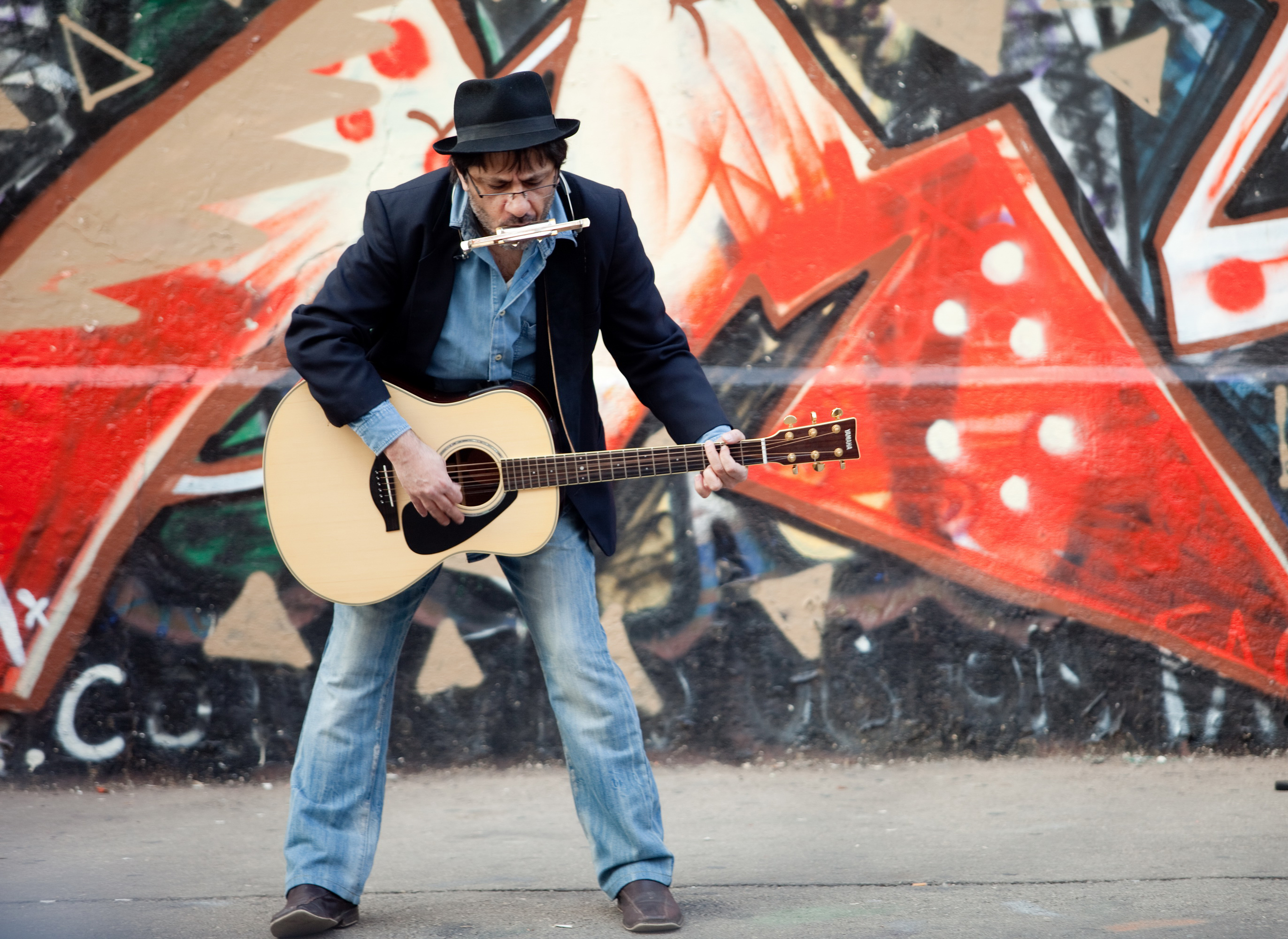 מאיר בנאי